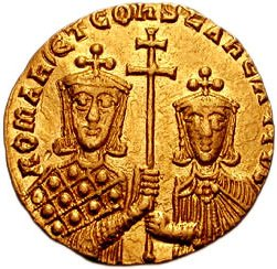 Gestileerde gekroonde bustes van Constantijn VII Porphyrogenitus en Romanus I, samen het patriarchale kruis vasthoudend, op de keerzijde van een gouden solidus (4.4g) geslagen in Constantinopel in 921. (de voorzijde van deze munt toont Jesus Christus op troon gezeten met het Nieuwe Testament.) Bron: Classical Numismatic Group, Inc. (CNG)